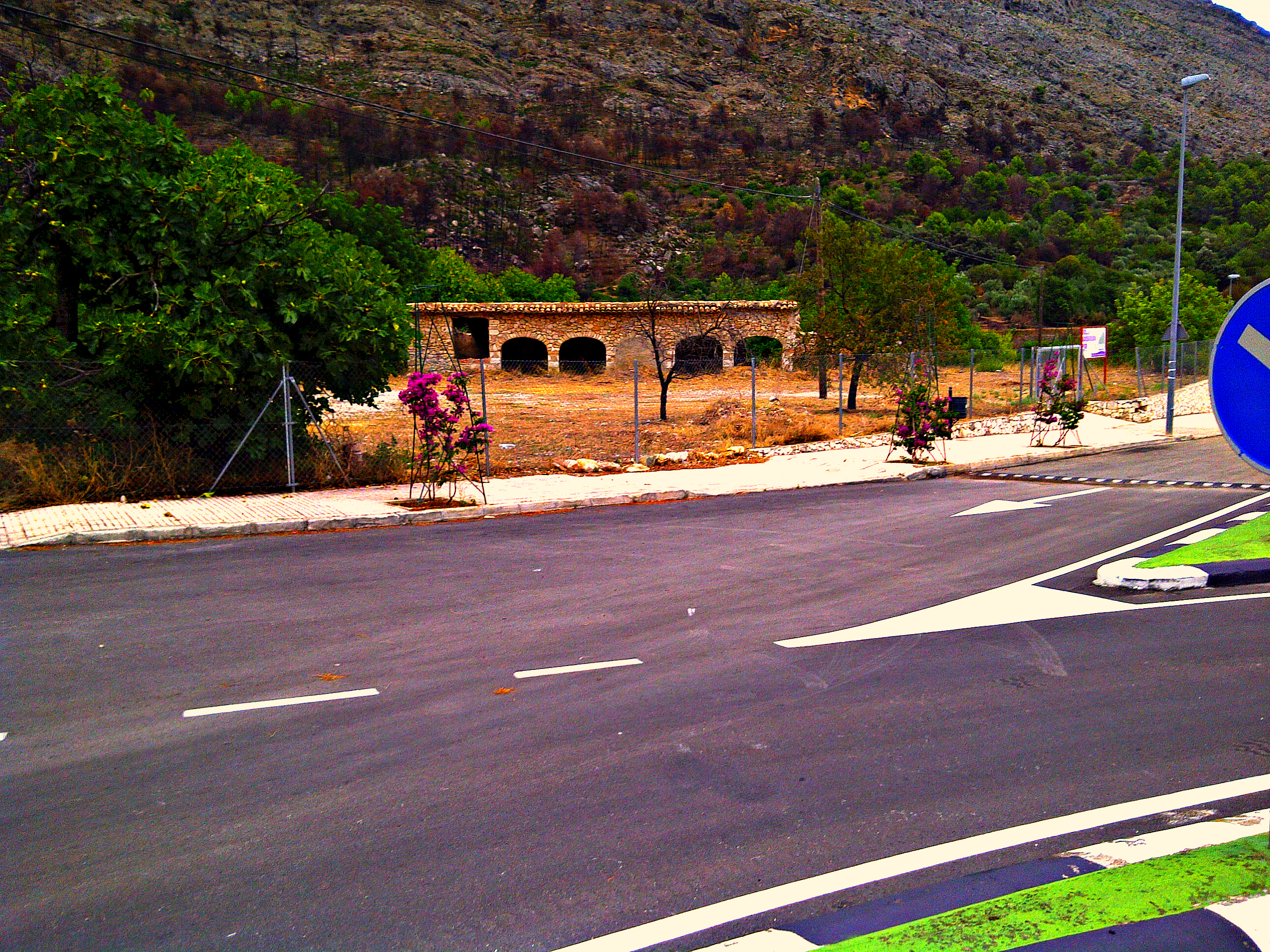 L'Associació Riuraus Vius enceta una campanya per a salvar els Riuraus a la Marina Alta